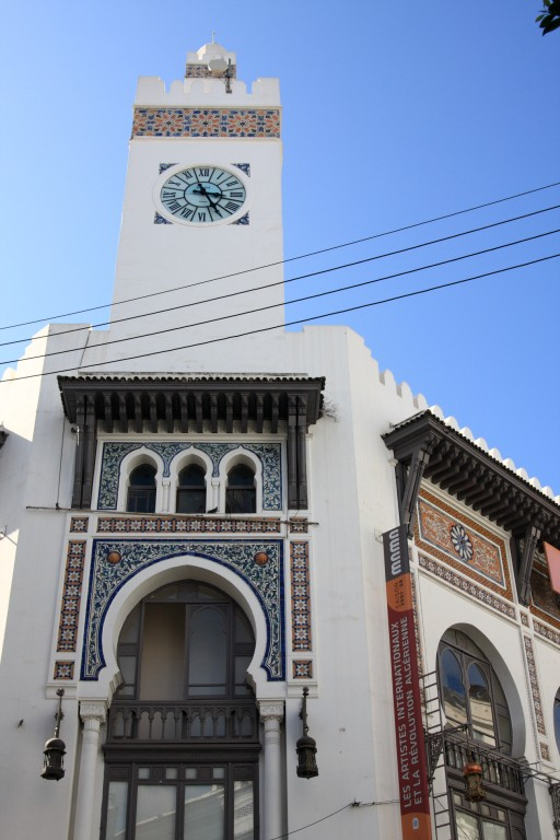 La façade du musée d'art moderne d'Alger, en centre ville